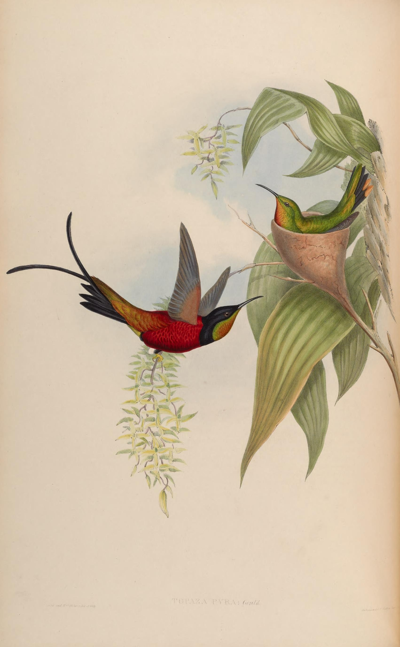 .//// il t-i!,.:i(..-,i'i ,t AV/f "^ L ' . K .\ ; (ff'/f/rl ^ti'iuiif*'